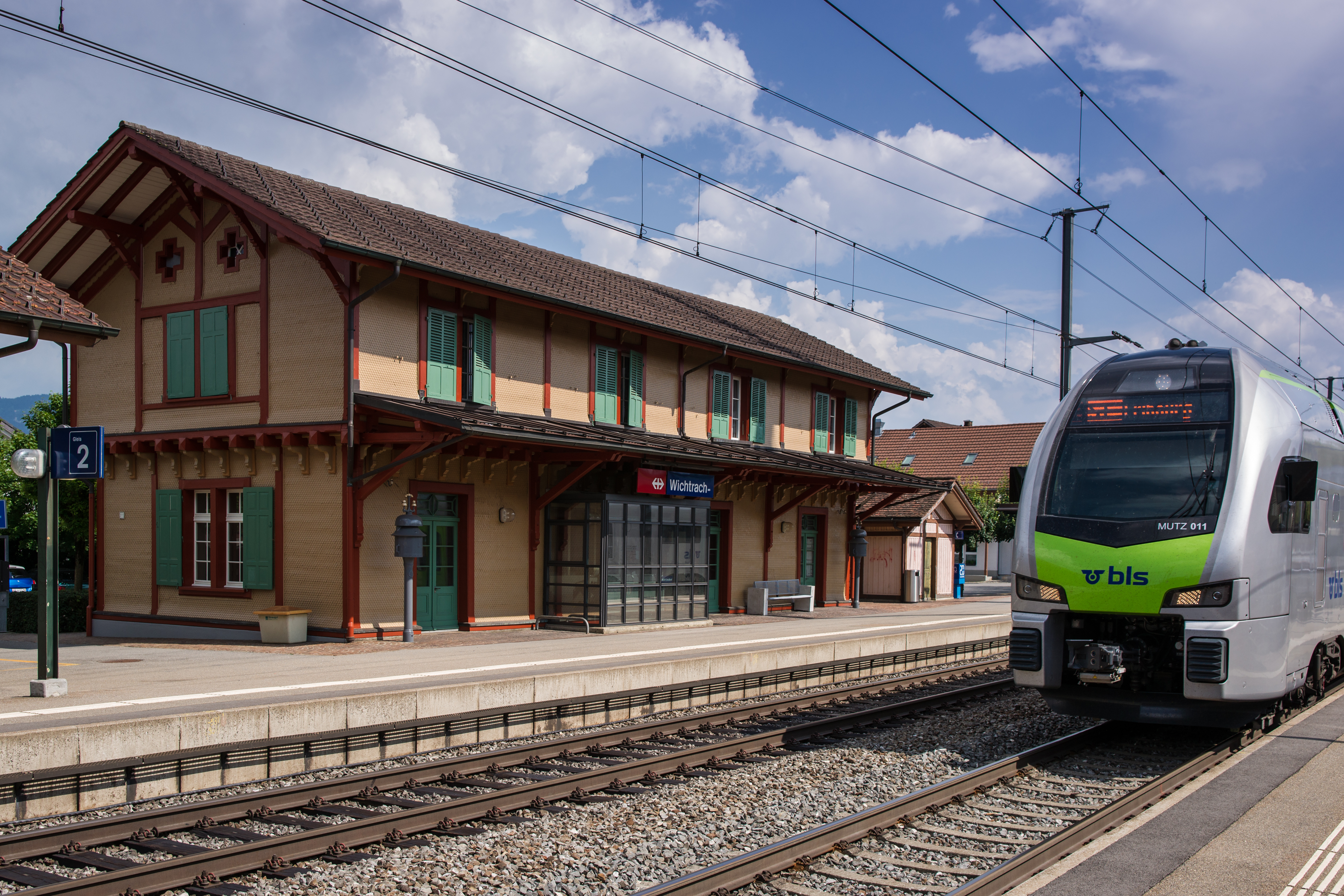 Bahnhof mit Güterexpedition, nicht mehr in Betrieb